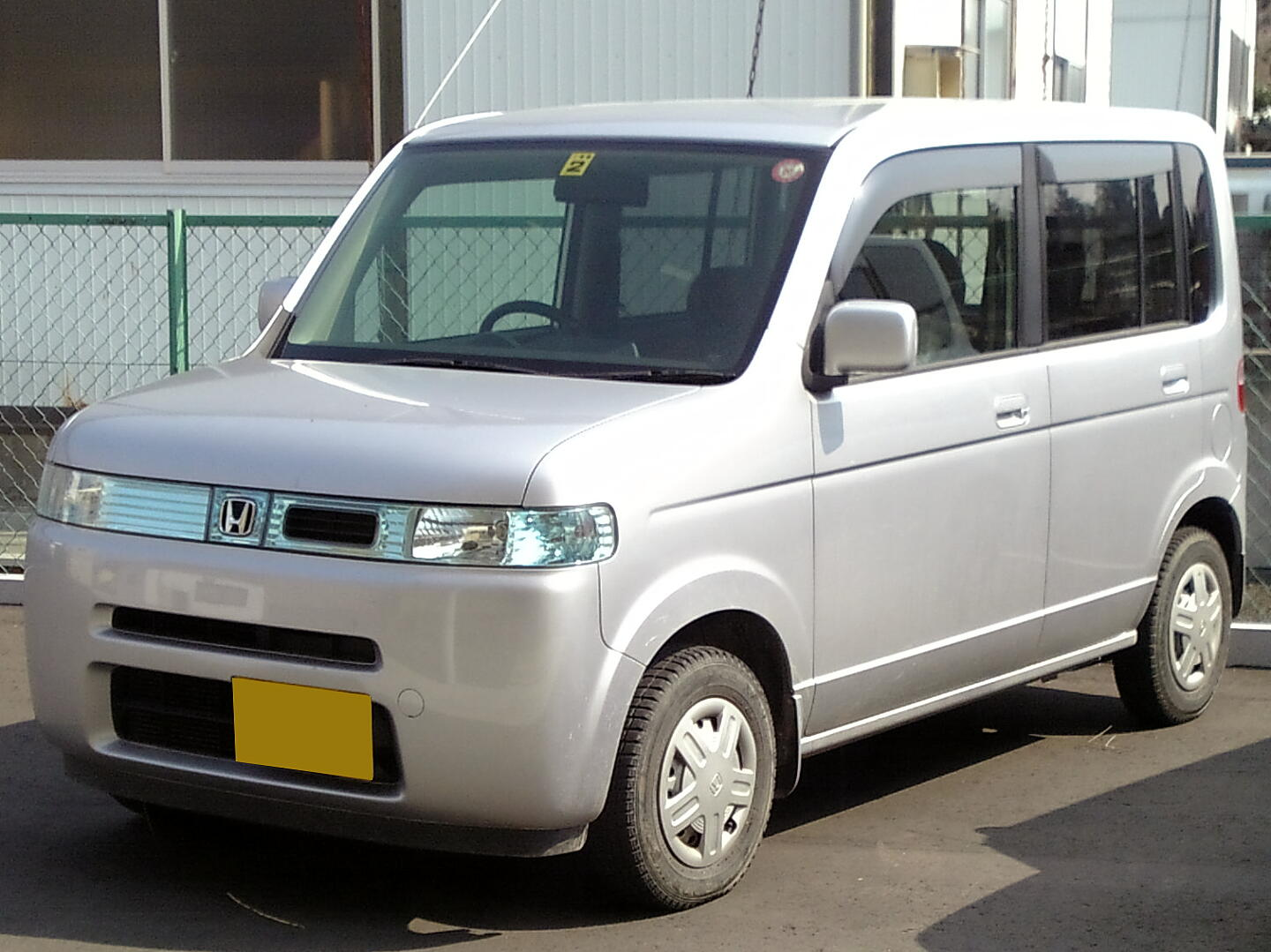 ホンダ・ザッツ